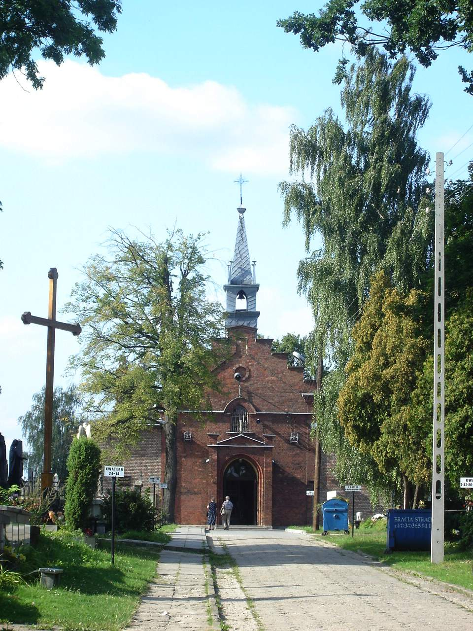 Częstochowa, Cmentarz Kule (Kaplica Przemienienia Pańskiego w centralnej części cmentarza)